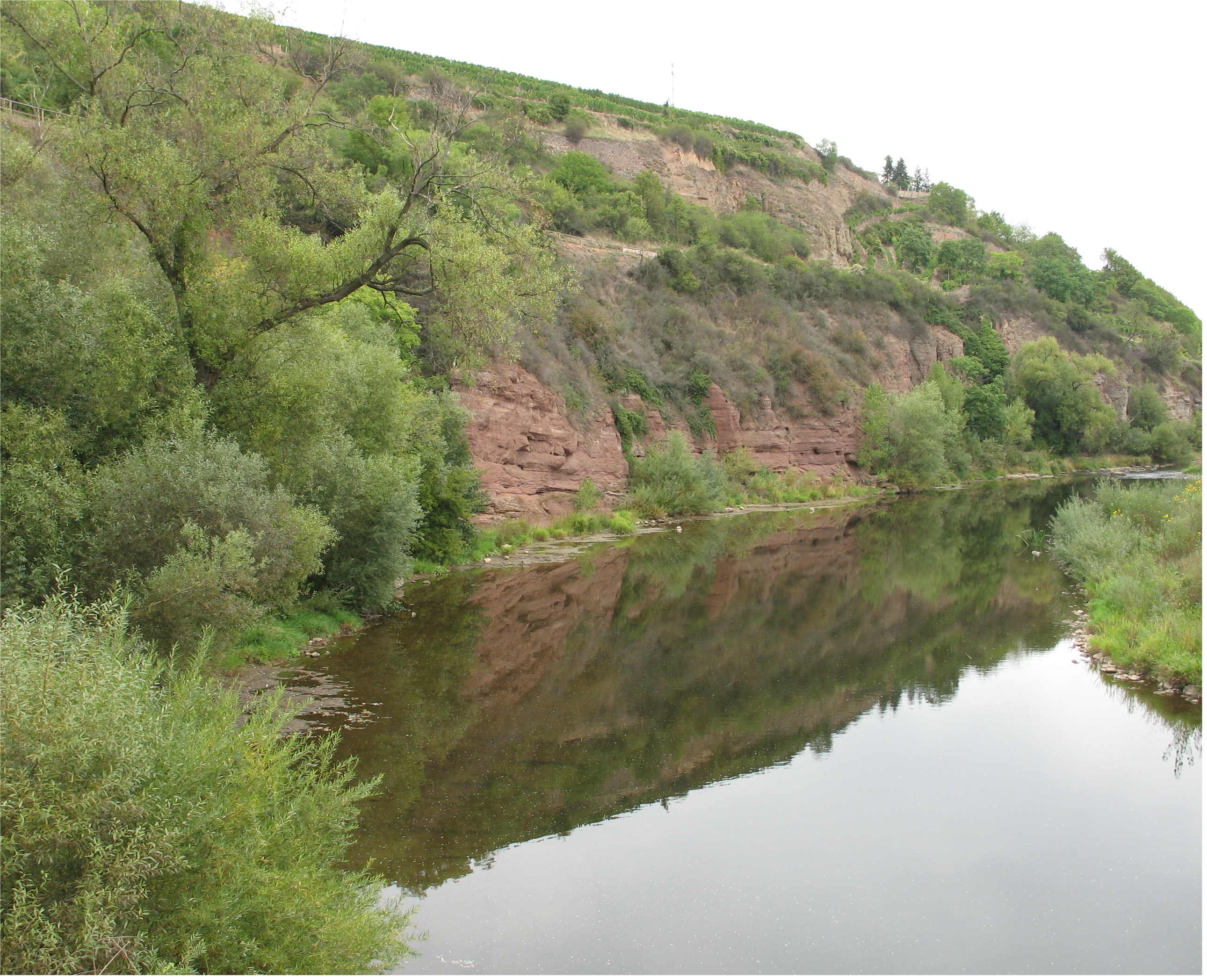 Die Nahe in Bad Kreuznach, Blick flussabwärts auf Höhe der Crucenia-Thermen; Flusslauf und Steilufer links im Naturschutzgebiet „Kurpark Bad Kreuznach“